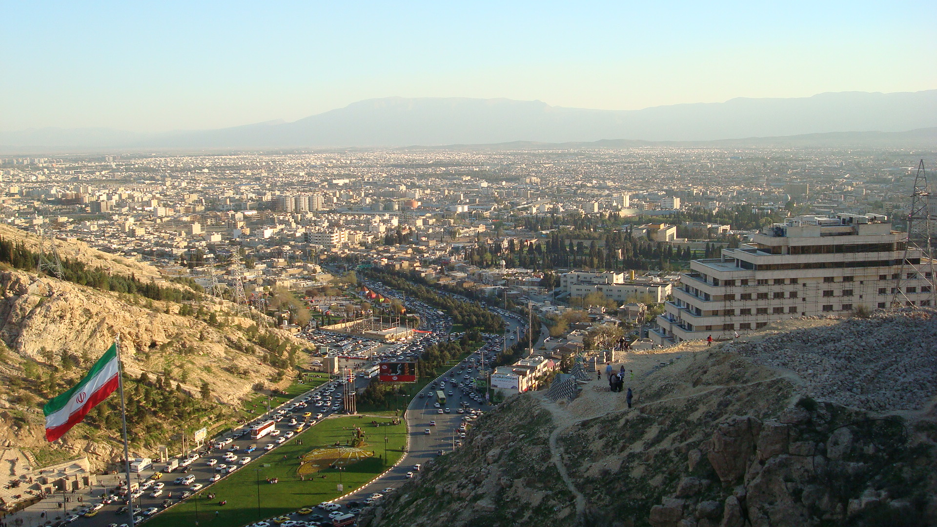 نمایی از شهر شیراز از بالای کوه مشرف به دروازه قرآن - شیراز